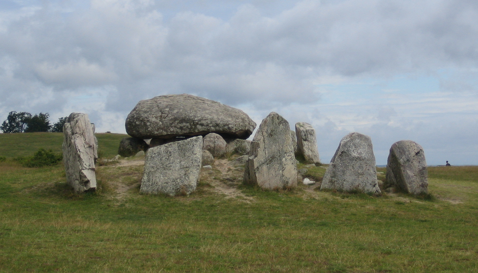 Stone age monument, Haväng, Sweden